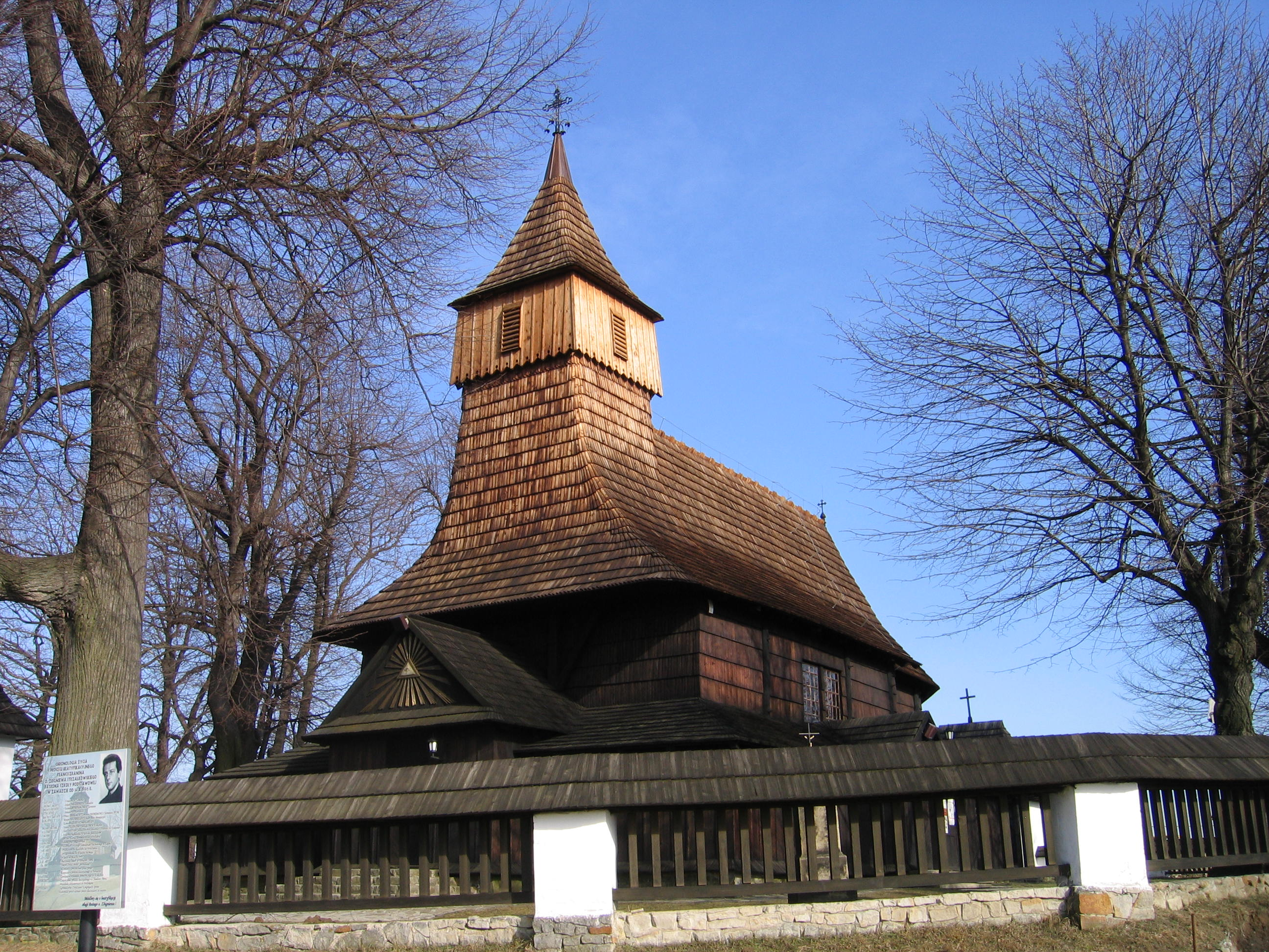 Zawada - kościół pw. św. Marcina, widok od zachodu (zabytek nr A-138)